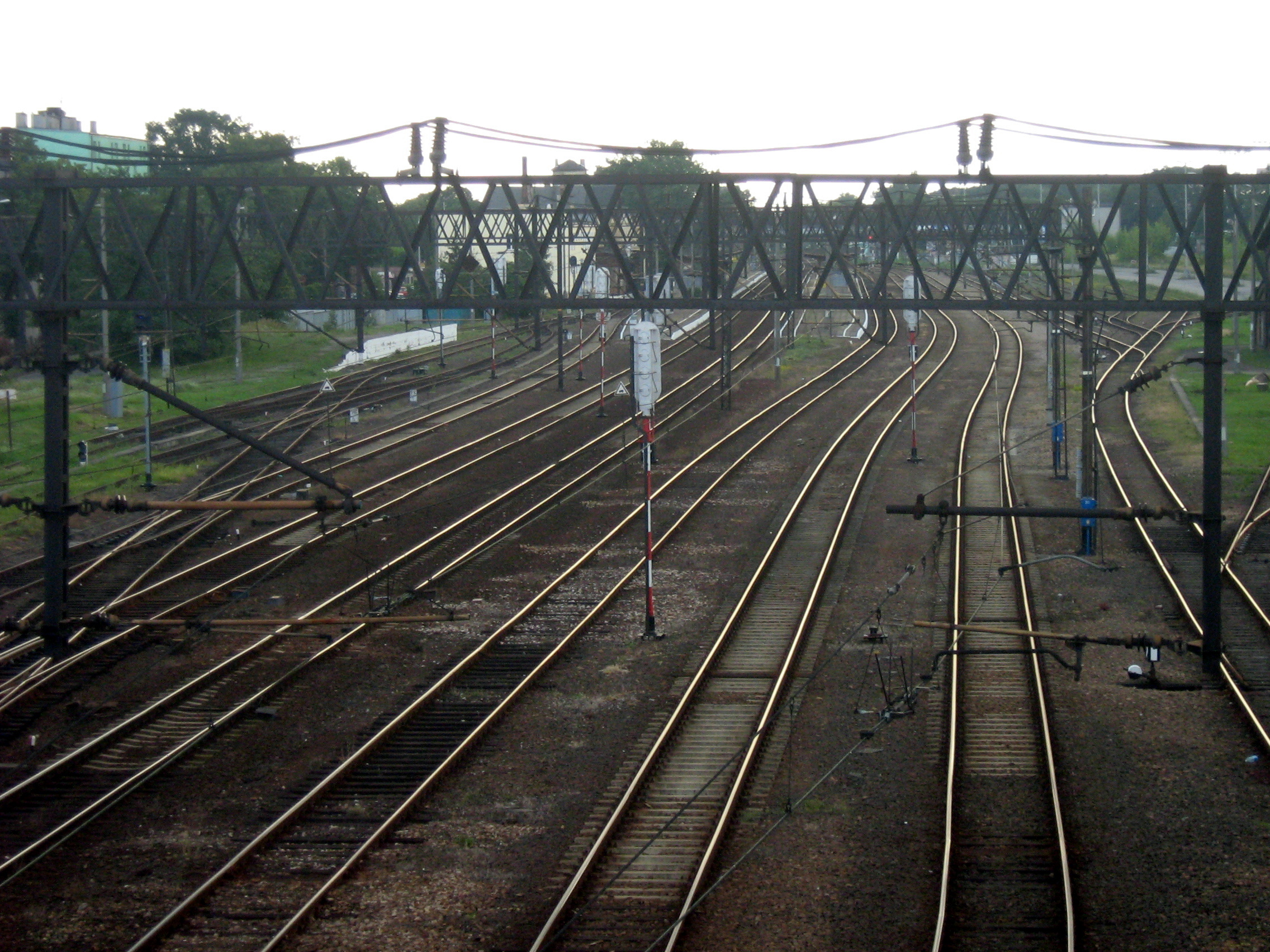 Linia kolejowa nr 18 oraz Linia kolejowa nr 281 w Nakle nad Notecią.